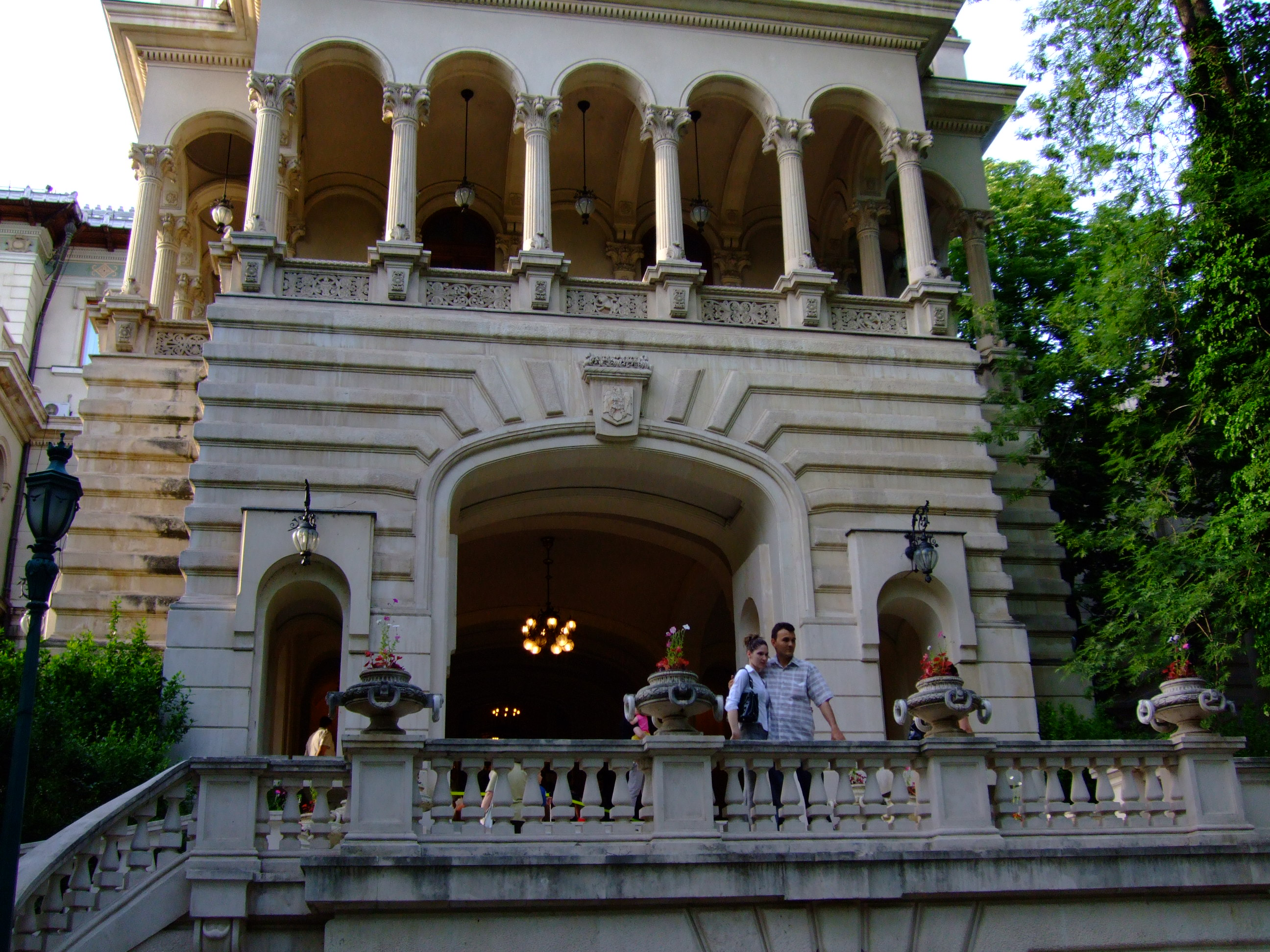 Cotroceni Palace - Bucharest 18.05.2008